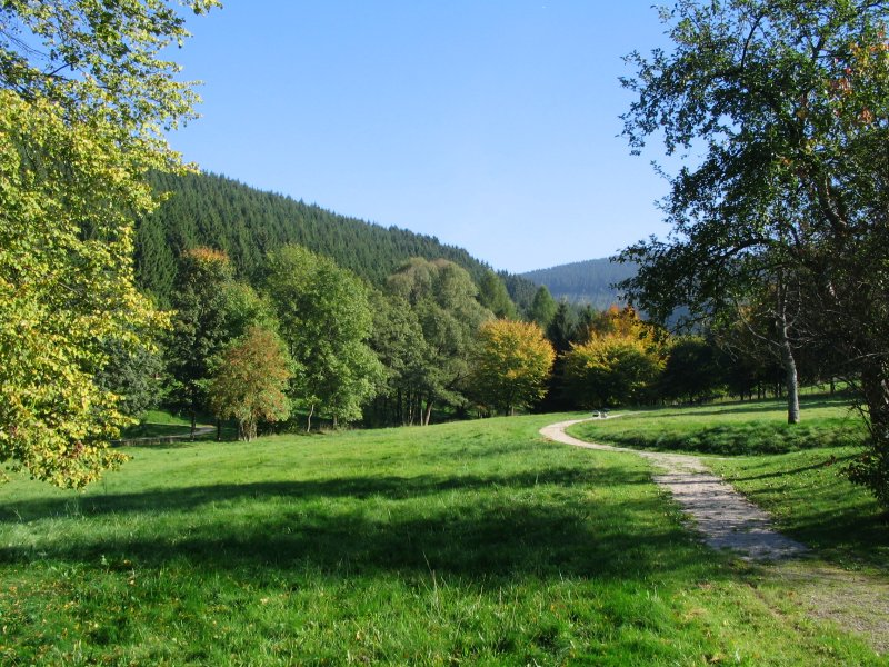 Kurpark in Oberhundem in der Gemeinde Kirchhundem, NRW, Deutschland